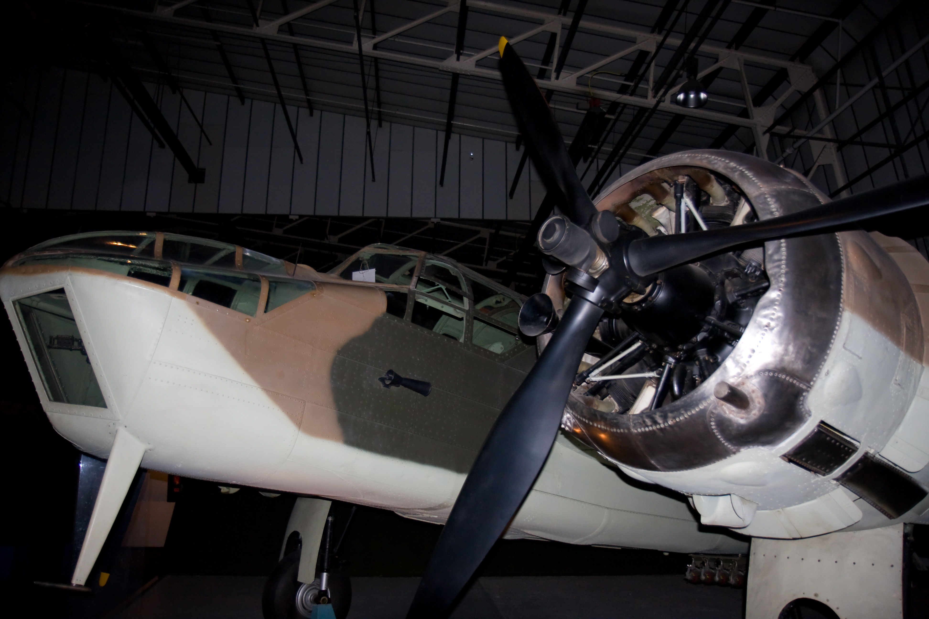 Bristol Blenheim IV